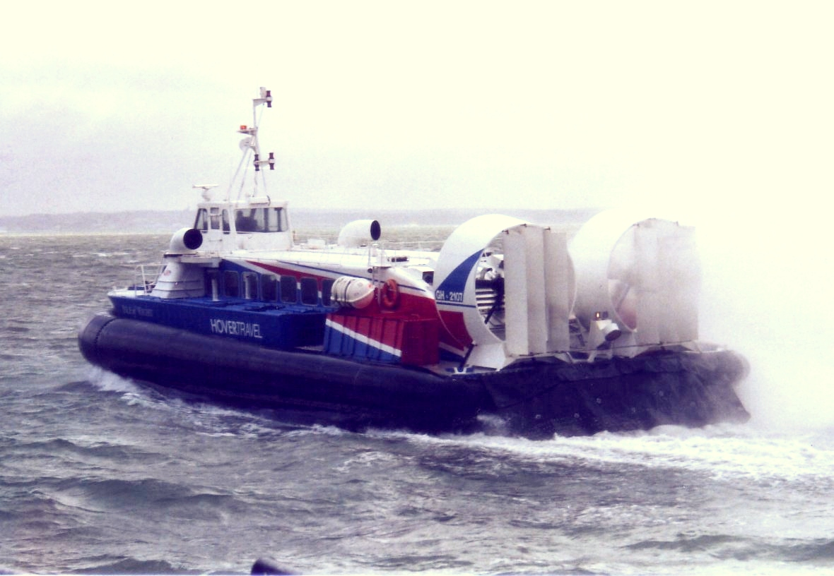 Ein AP1-88/100 Hovercraft verlässt Southsea in Richtung Isle of Wight